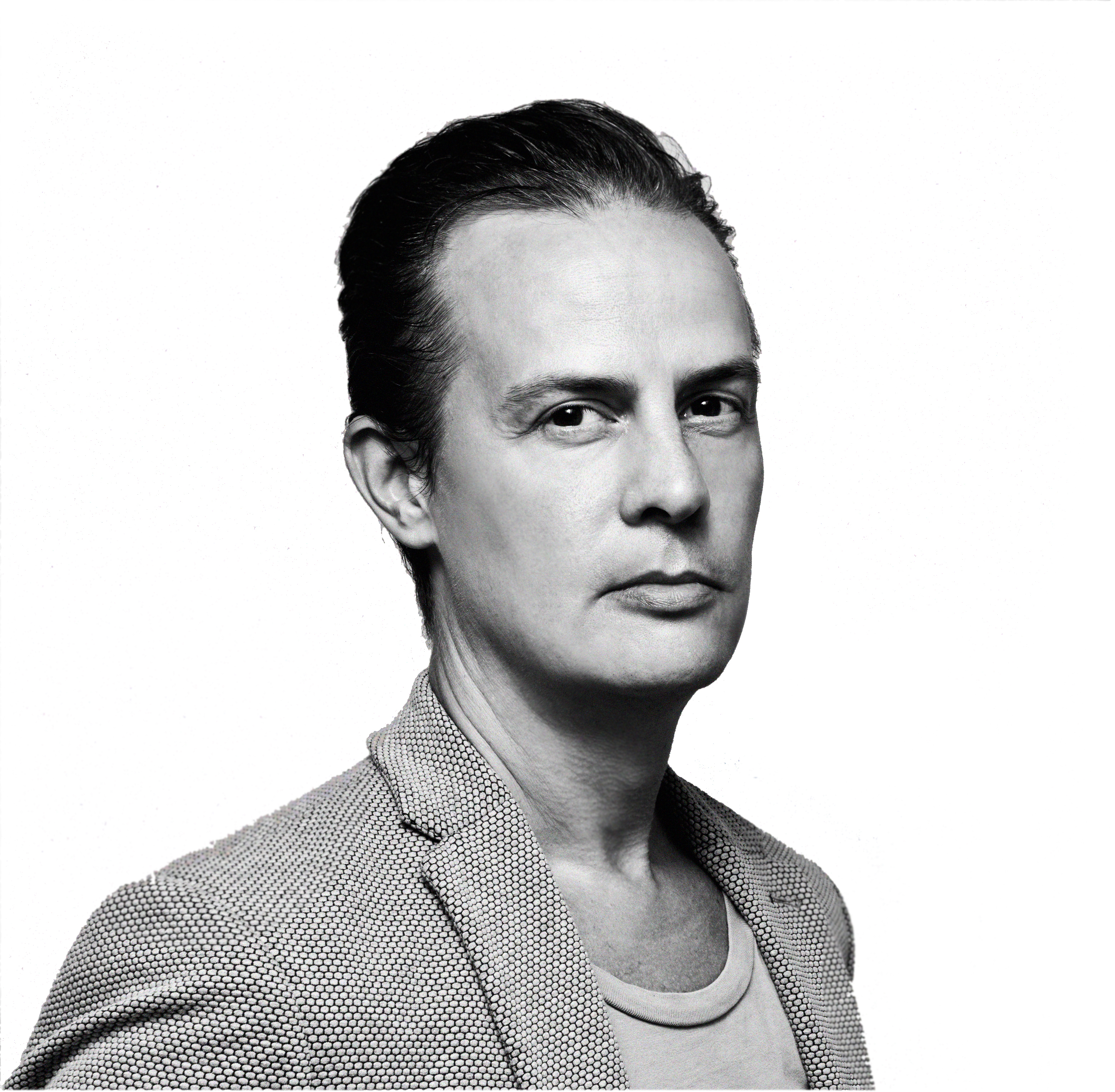 Foto: Timmo Schreiber